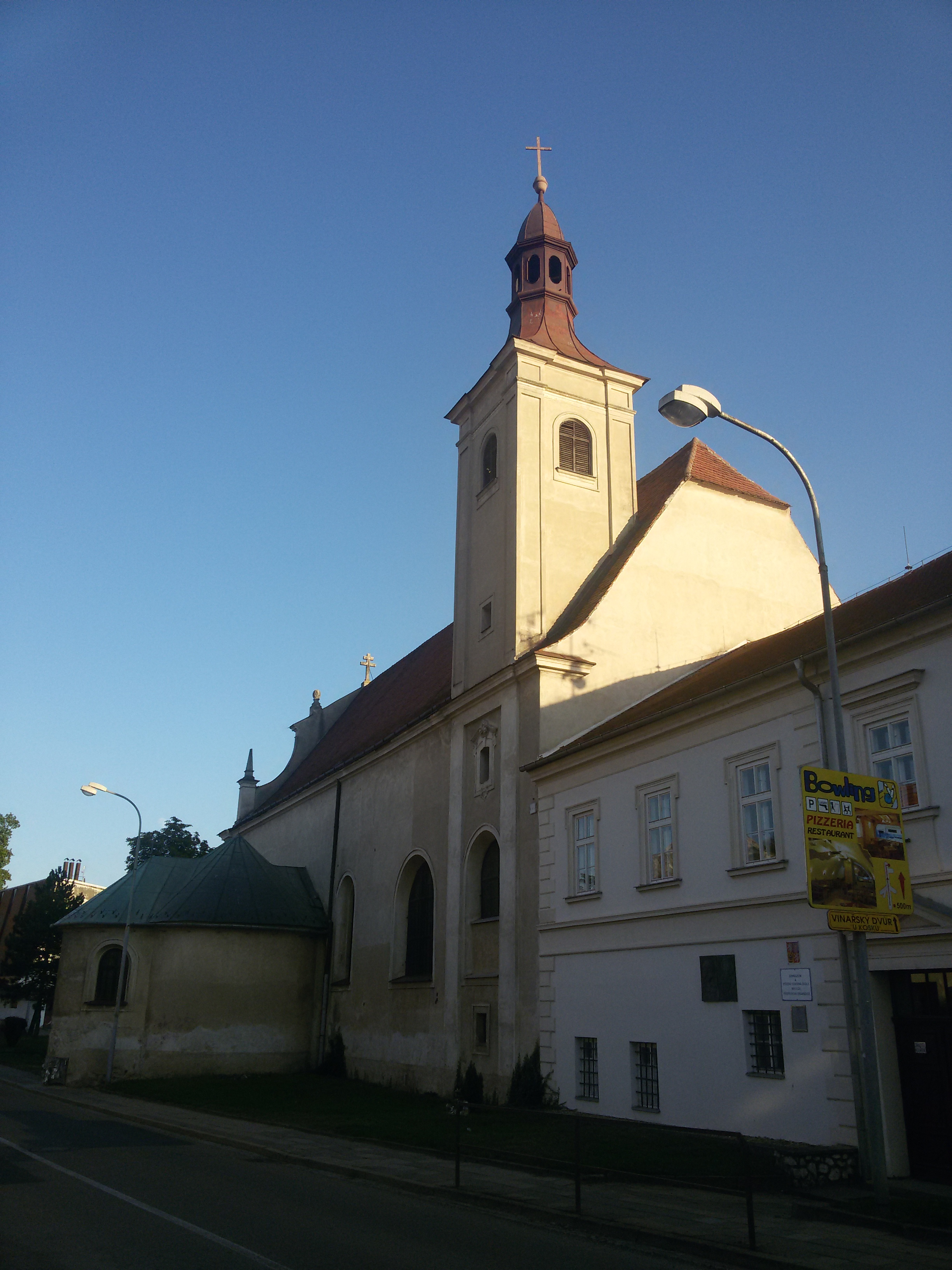 Church of Saint John the Baptist (Mikulov)